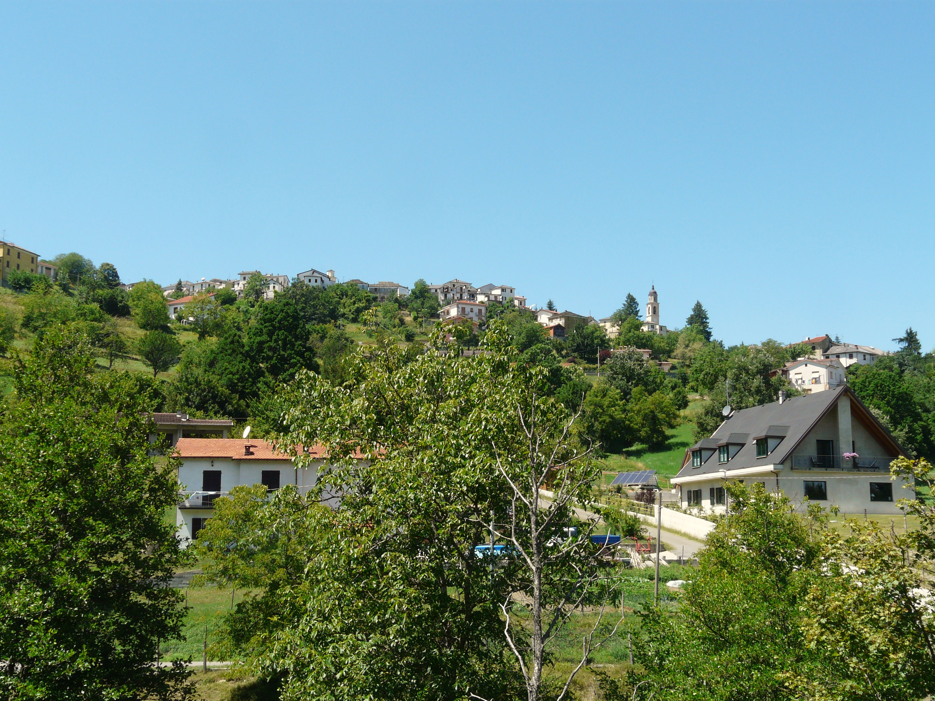 Tornolo, Emilia Romagna, Italia